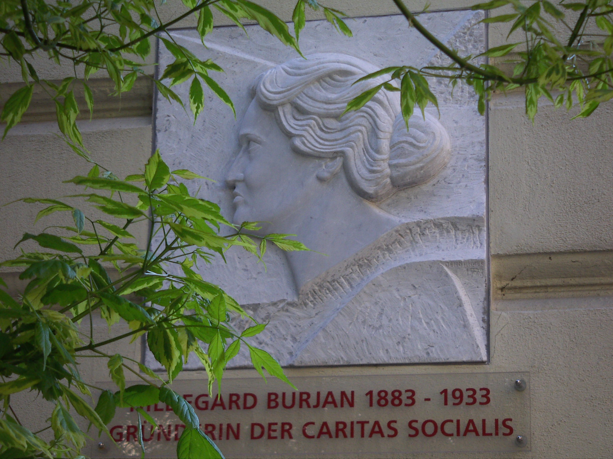 Hildegard Burjan, Pramergasse 7, Verena-Buben-Weg, 1090 Vienna